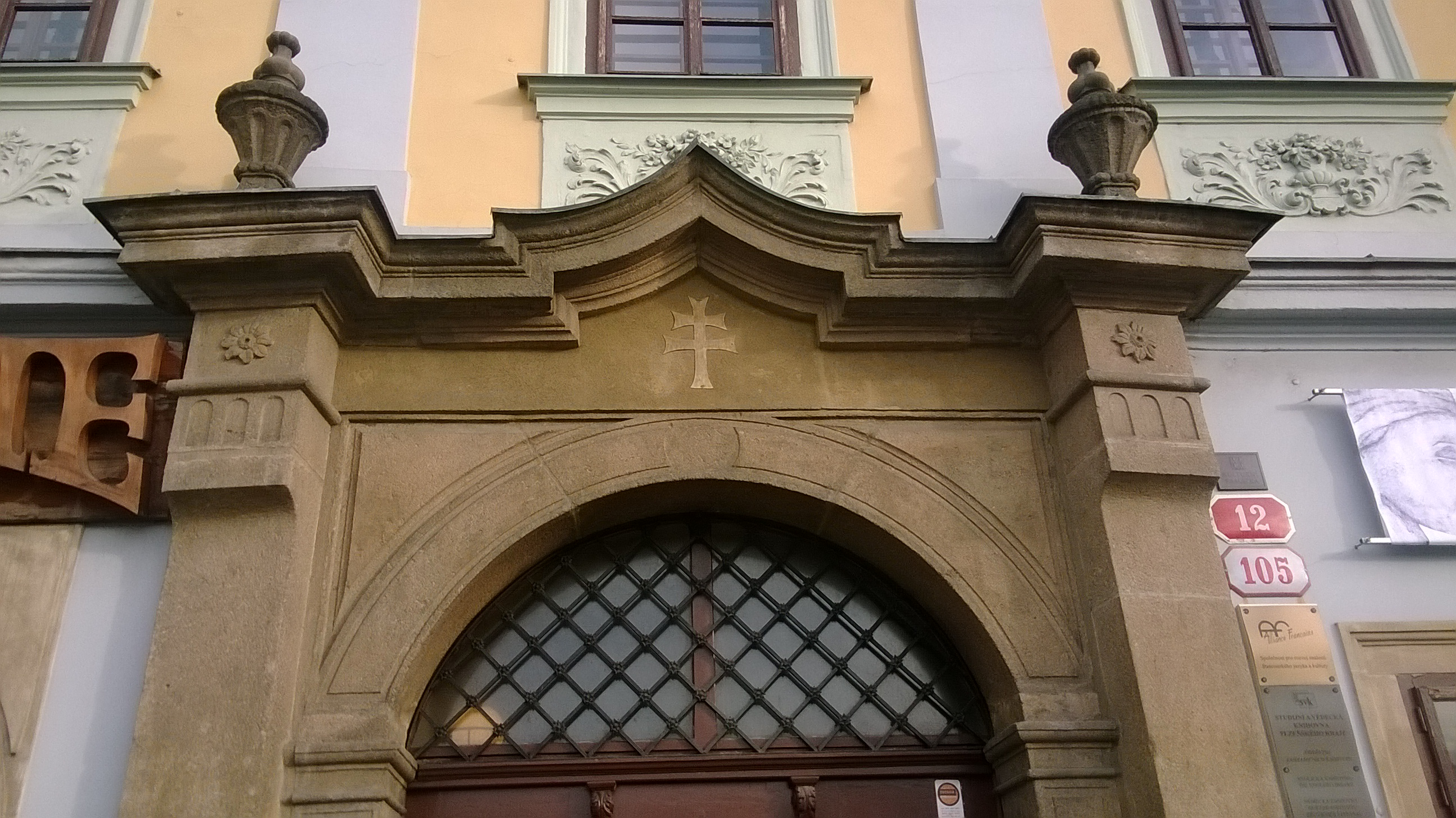 Portál Scriboniovského domu